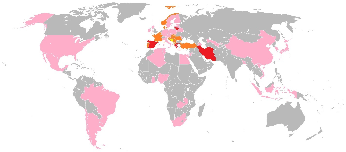 Carte de statistiques des matchs de la Bosnie-Herzégovine contre les autres sélections mondiales